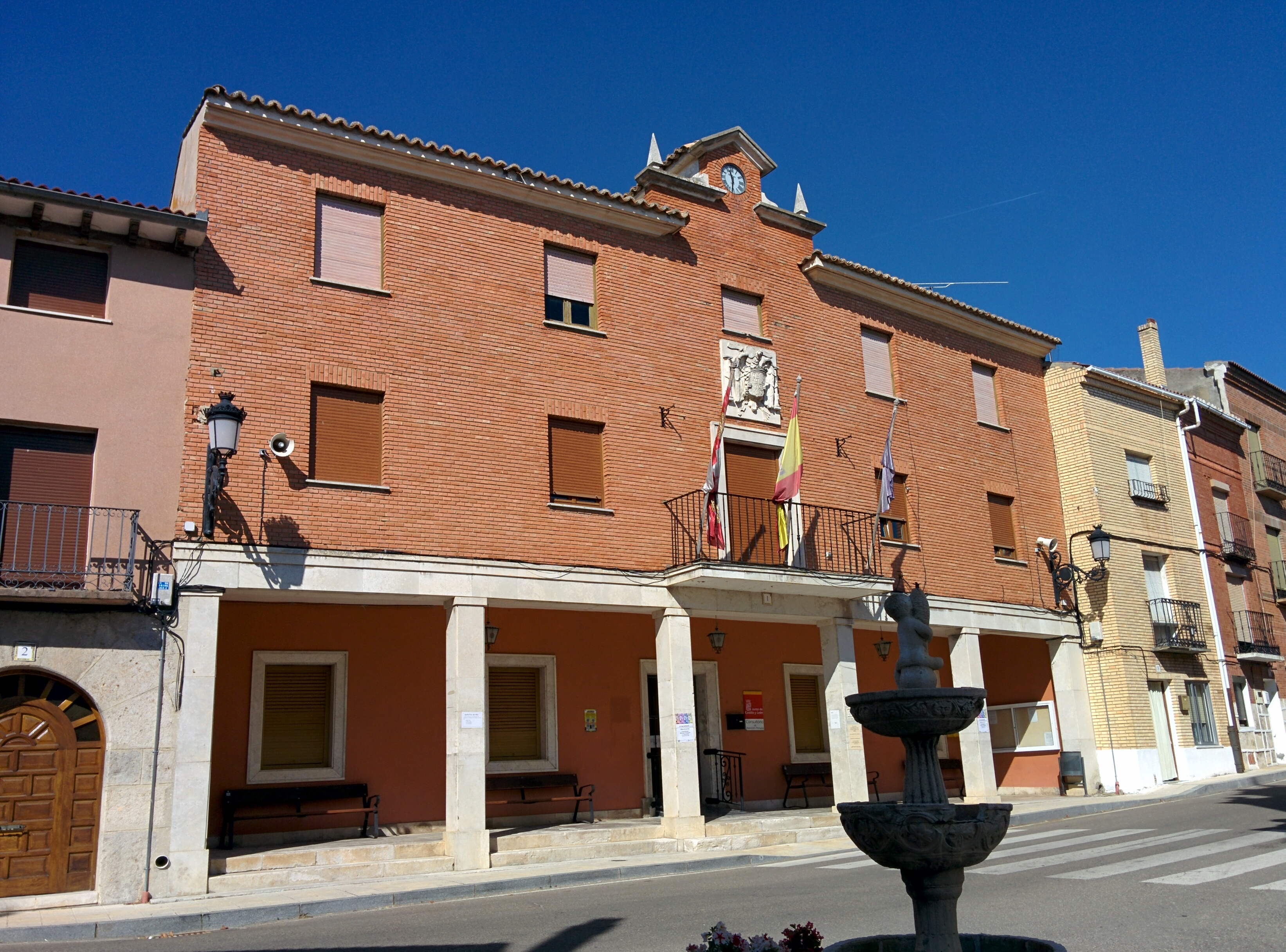 Casa consistorial de Cevico de la Torre (Palencia, España).